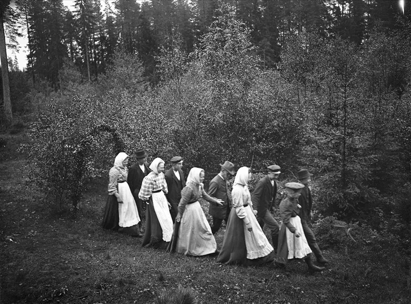 Depicted person: N E Hammarstedt, FIL DOKTOR depicted place: Dalarna, Söderbärke, Lövmarken (Sverige (SE))